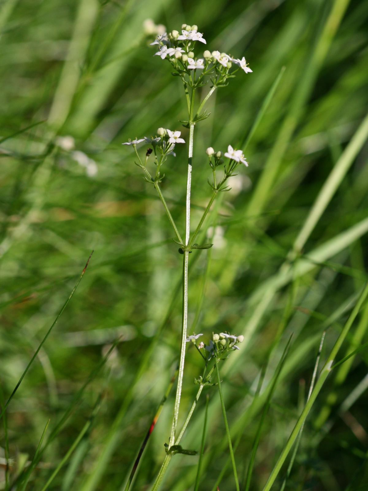 Harz-Labkraut (Galium harcynicum)